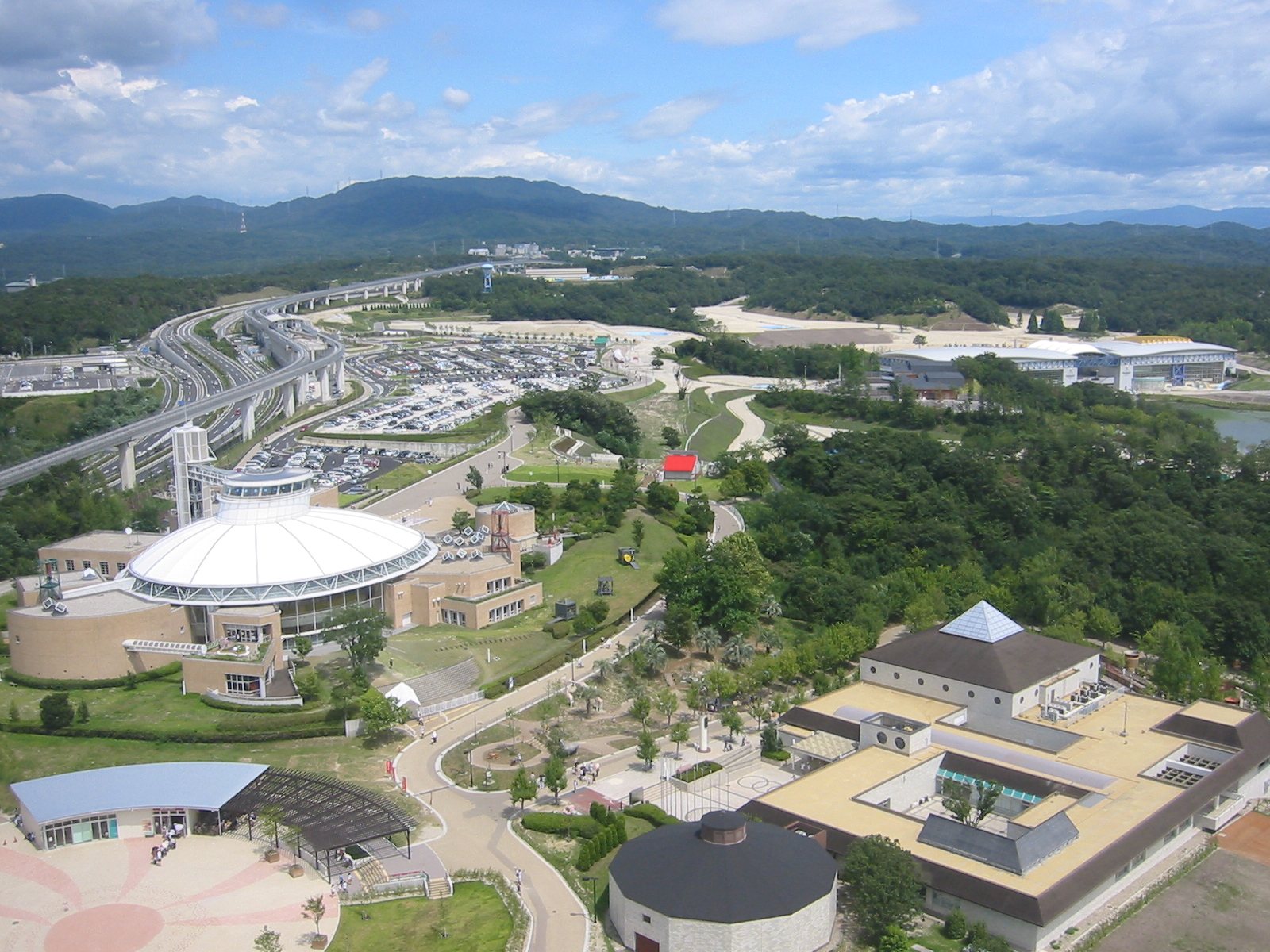 愛・地球博の跡地の愛・地球博記念公園の写真